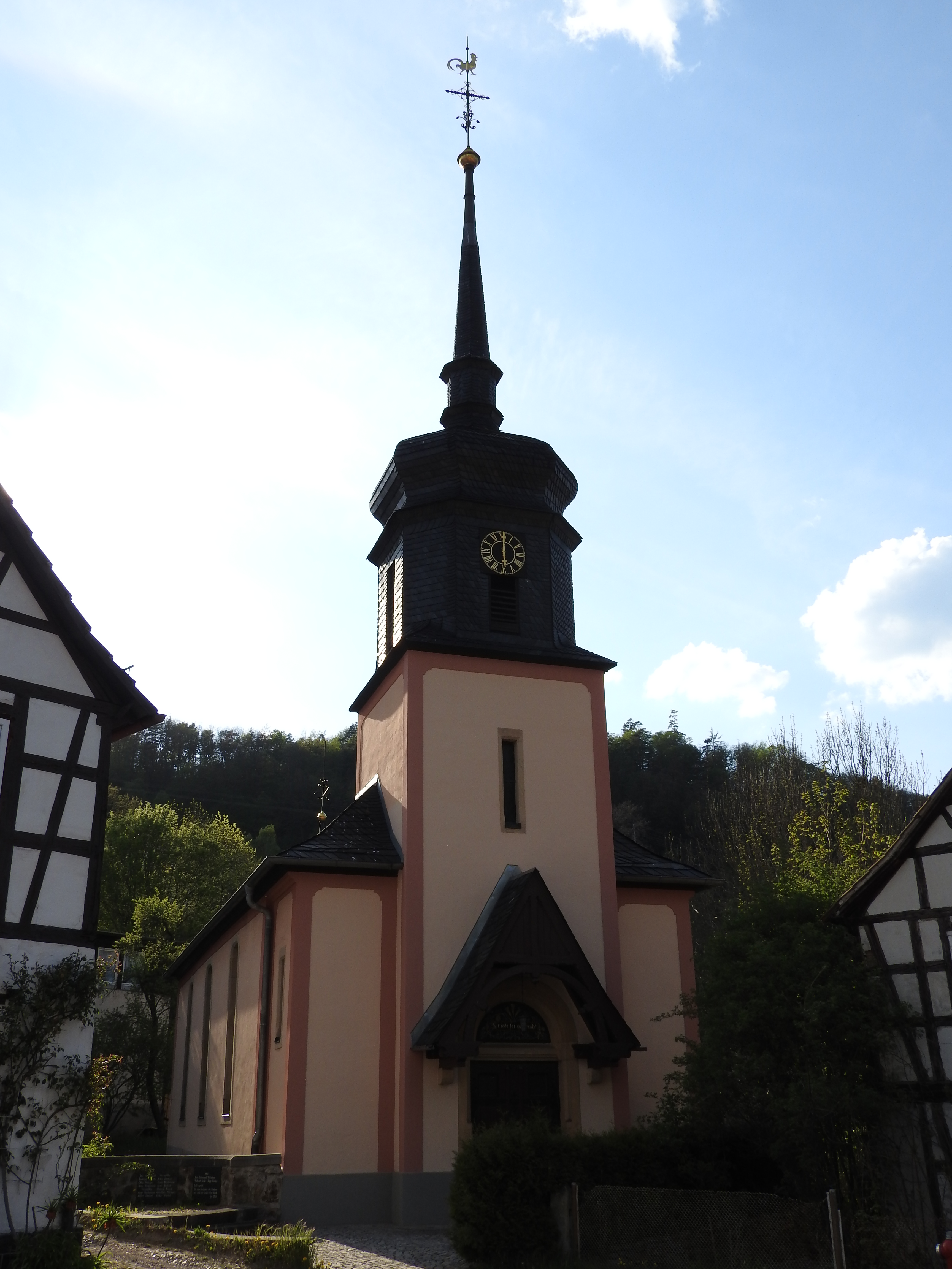 Evangelische Kirche von Reschwitz in Thüringen